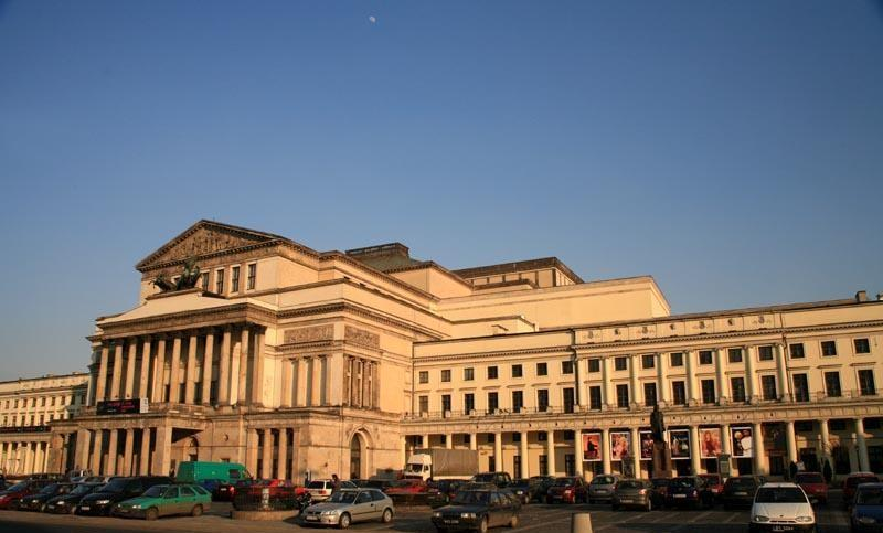 Warszawa (Polska)